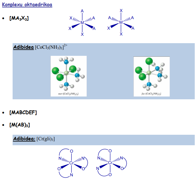 Konplexu oktaedrikoa eta adibidea